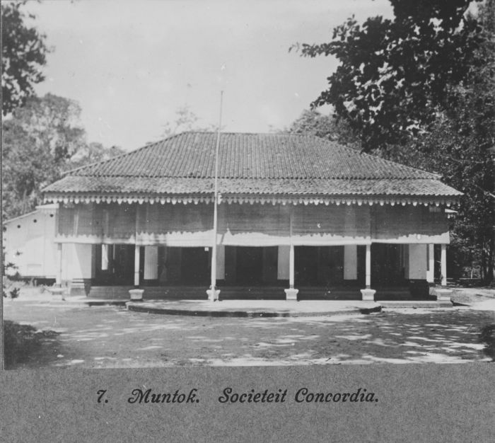 foto. Sociëteit Concordia in Muntok